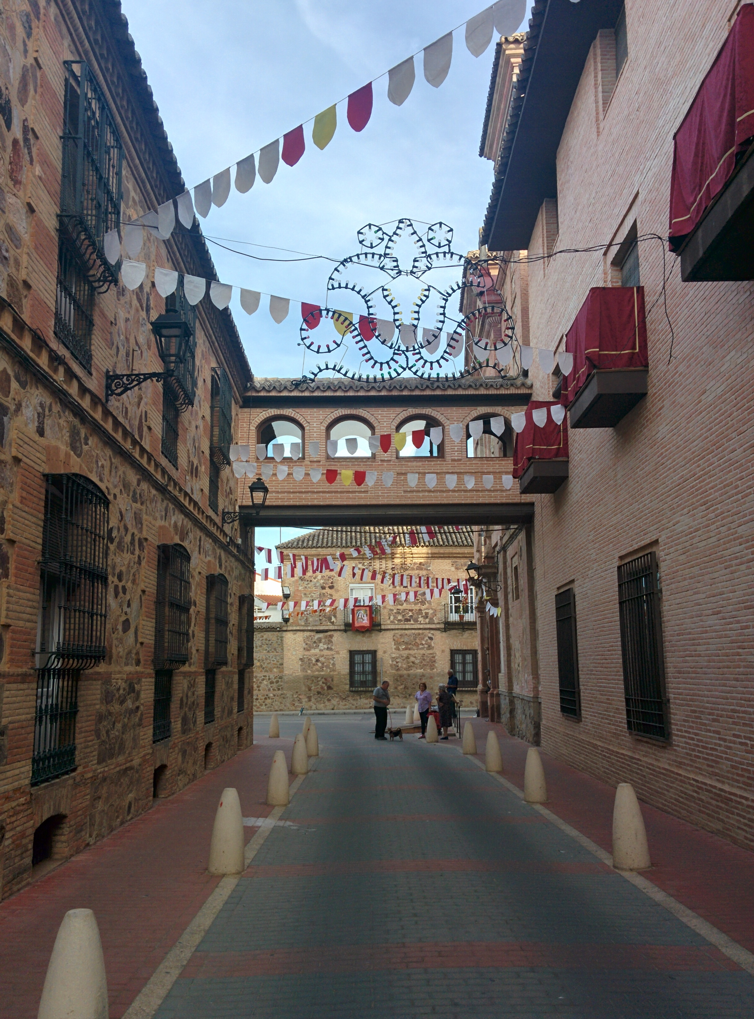 Calle en Herencia (Ciudad Real, España).